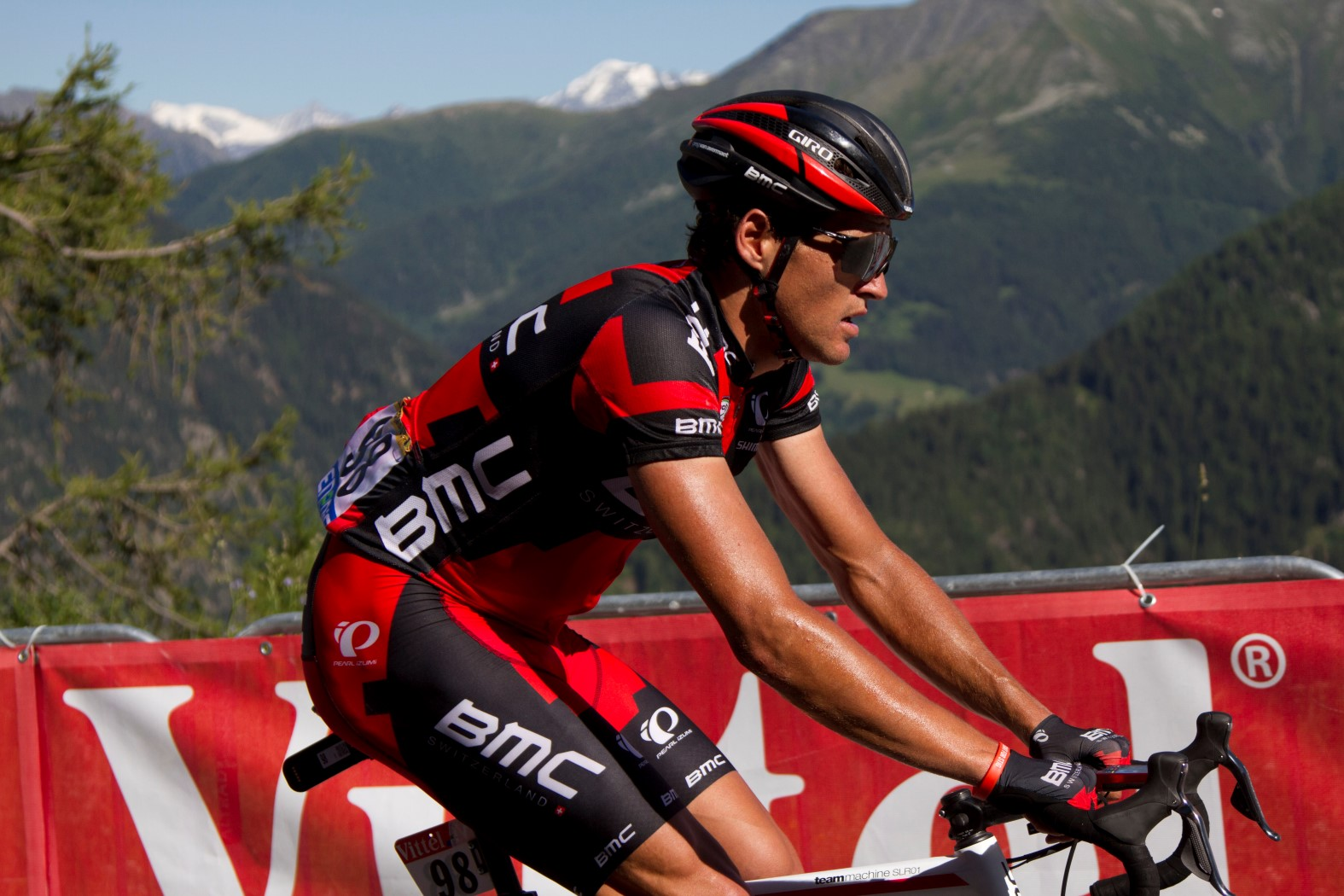 272 van avermaet